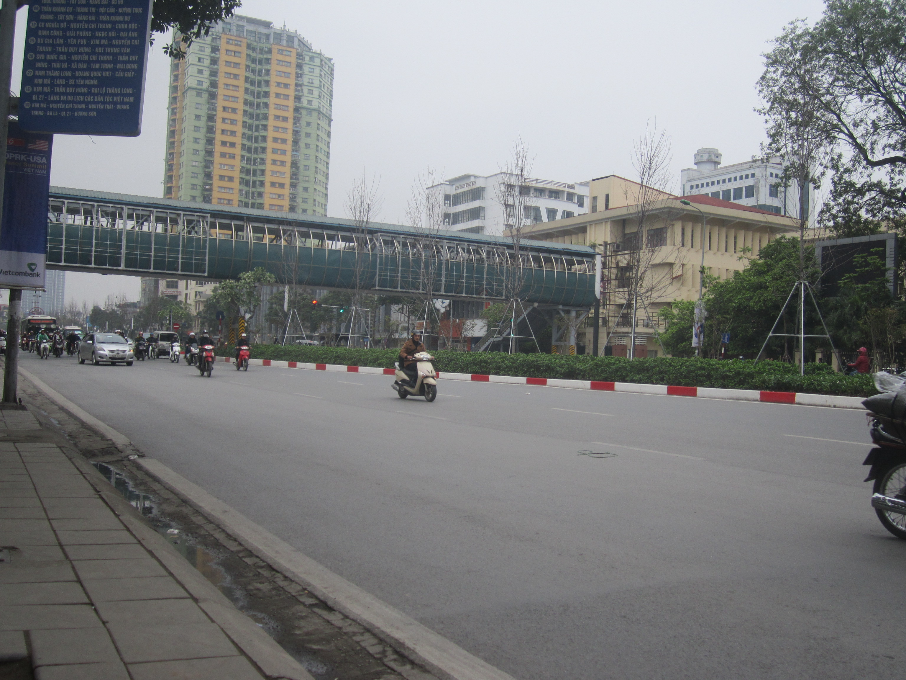 Đường Nguyễn Chí Thanh Hà Nội